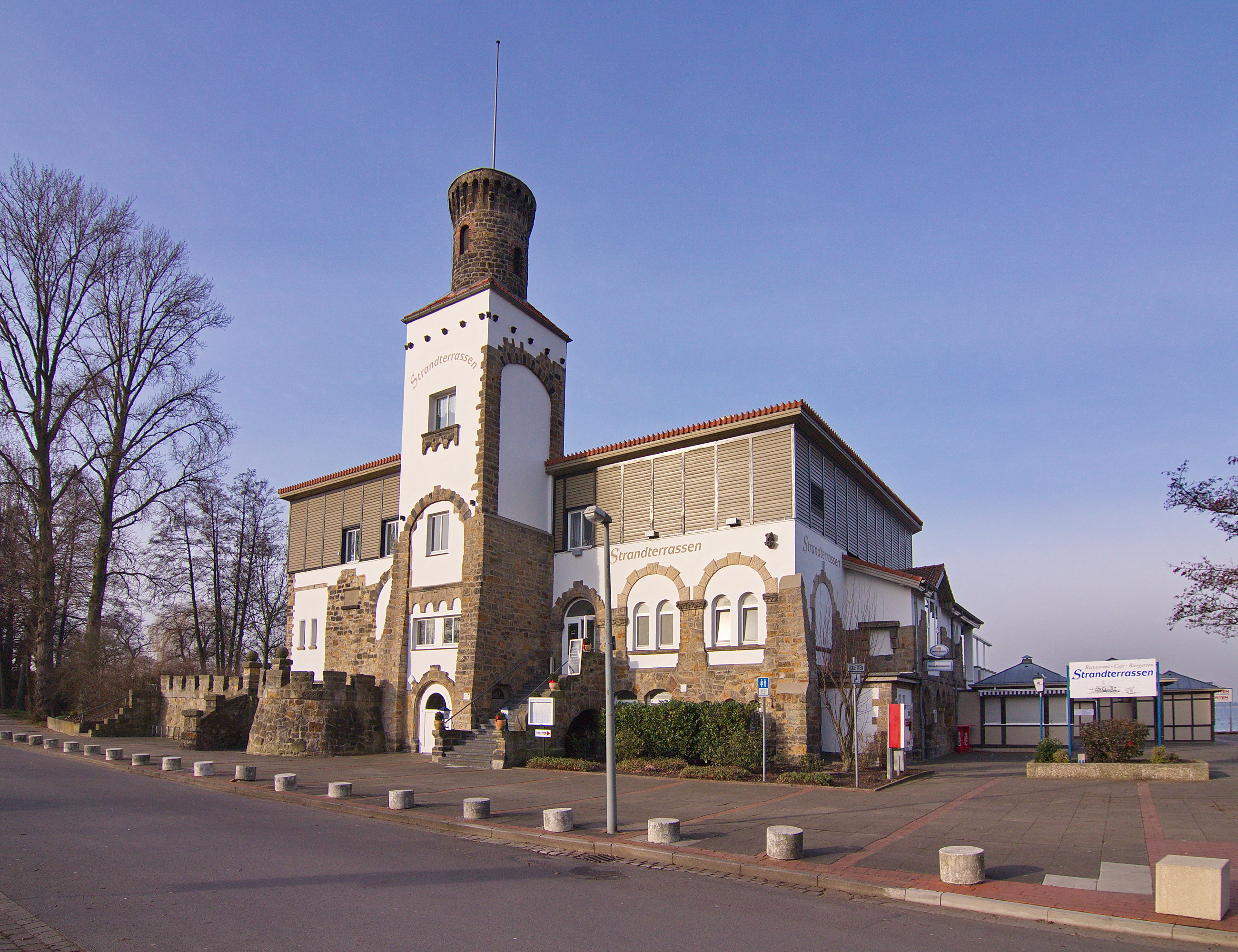 Strandterassen in Steinhude (Wunstorf), Niedersachsen, Deutschland.